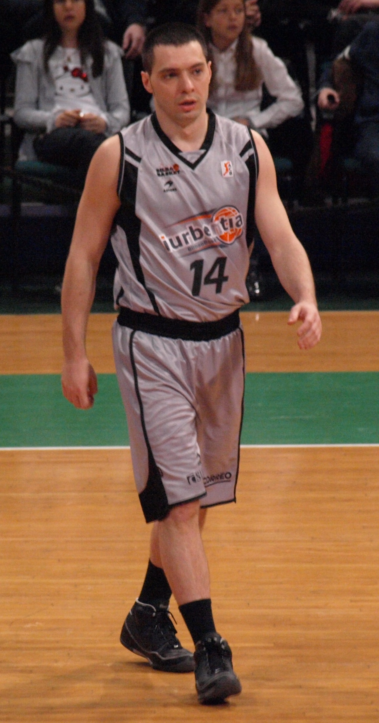 Javier Salgado en el encuentro que enfrentó al Iurbetia Bilbao con el DKV Joventut de la liga ACB 2008/09 en el olímpico de Badalona